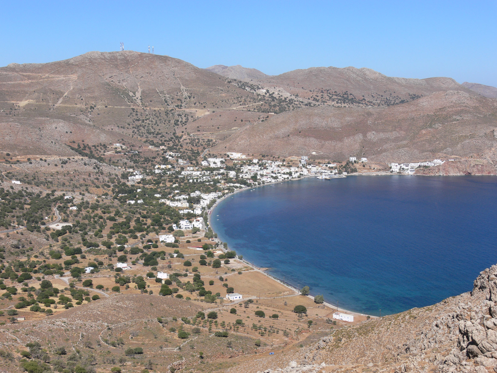 Hafenort Livadia auf der Dodekanes - Insel Tilos aus südlicher Richtung gesehen.